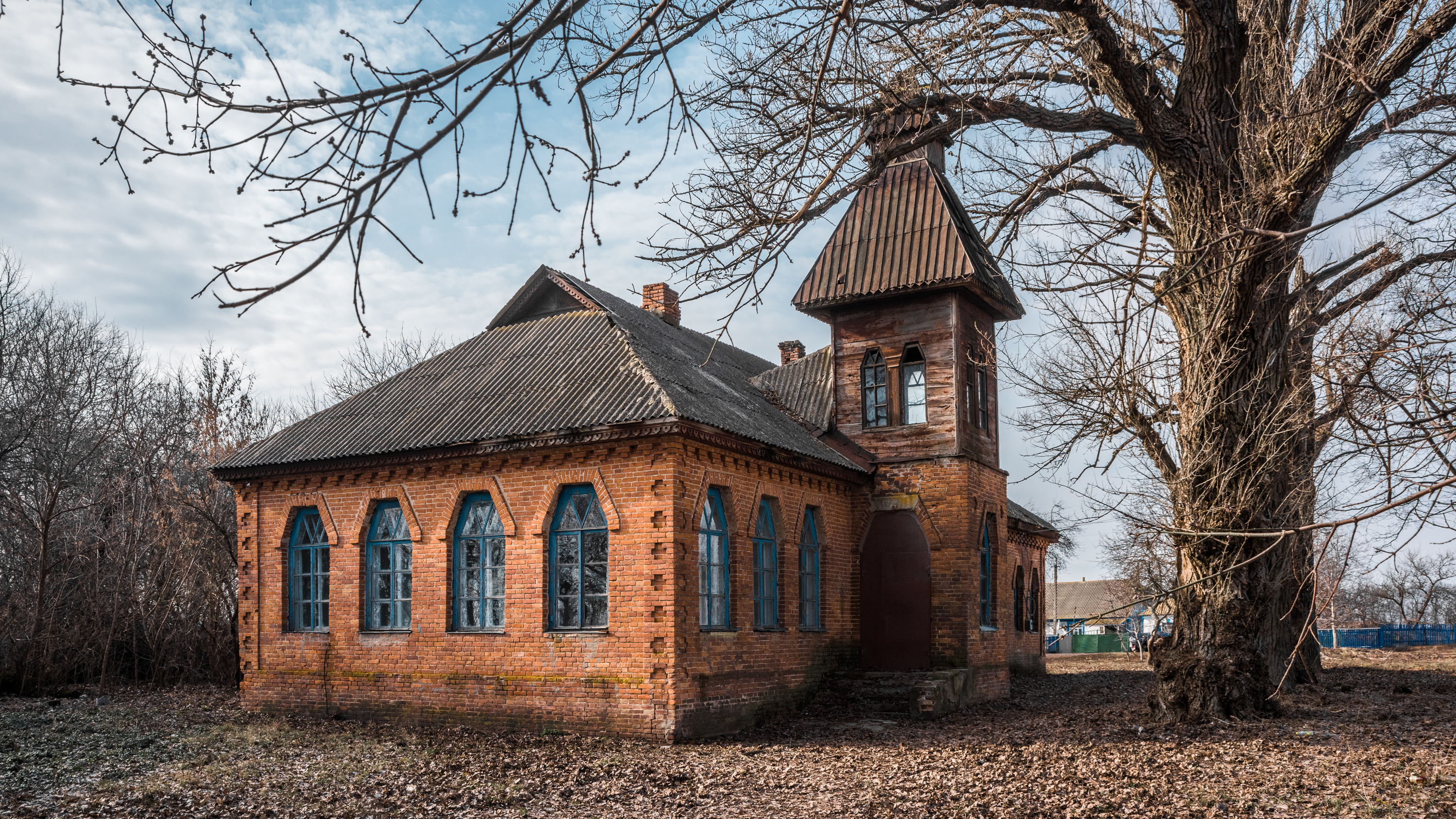 Однокомплектна земська школа в селі Синяківщина Чорнухинського району Полтавської області. Стиль - український архітектурний модерн. Архітектор Опанас Сластьон.